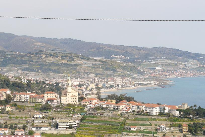 Panorama di Bussana dalla frazione Poggio di Sanremo, Liguria, Italia